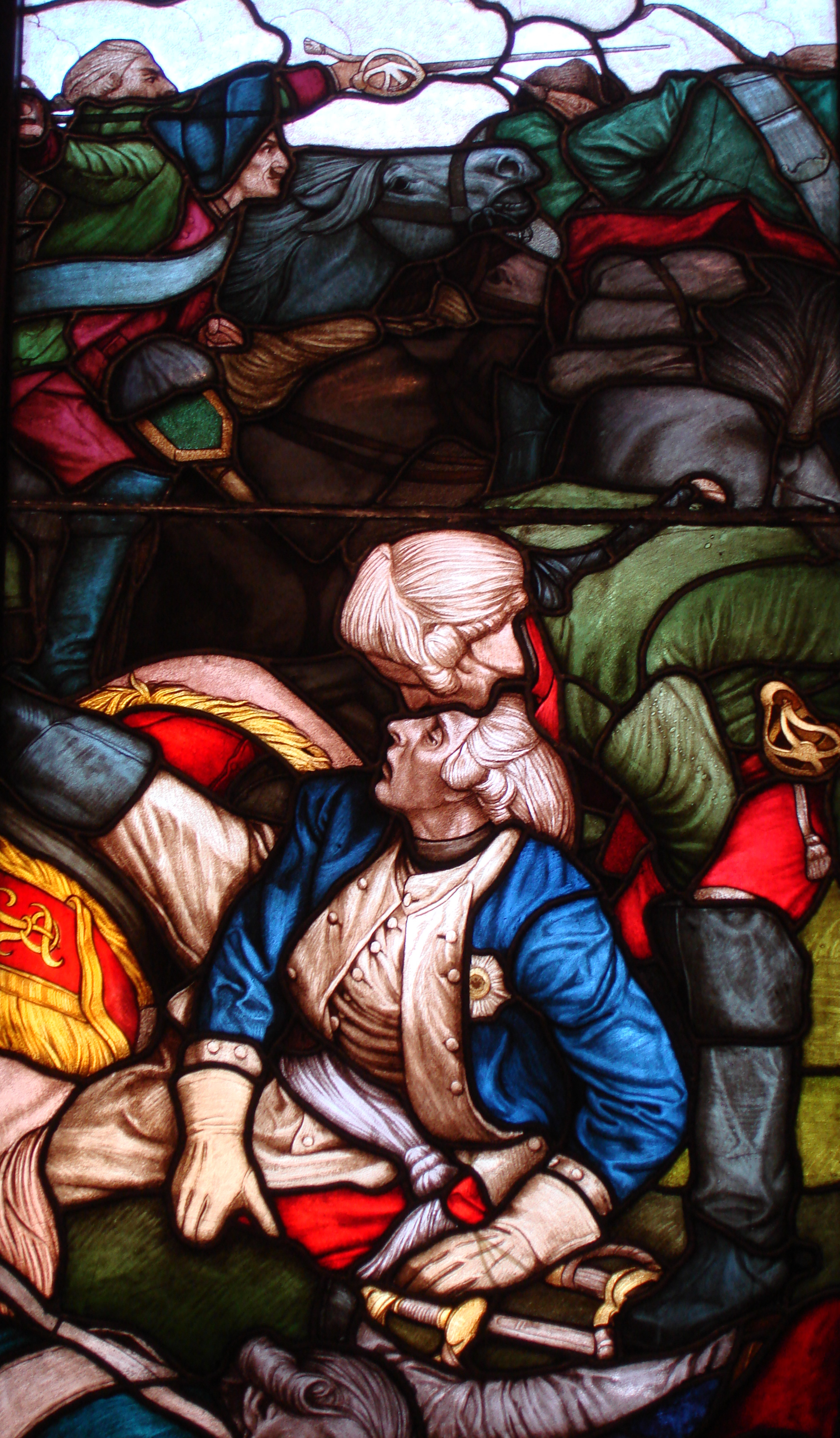 Kamienna Góra, ratusz, witraż, pojmanie gen. Fougues